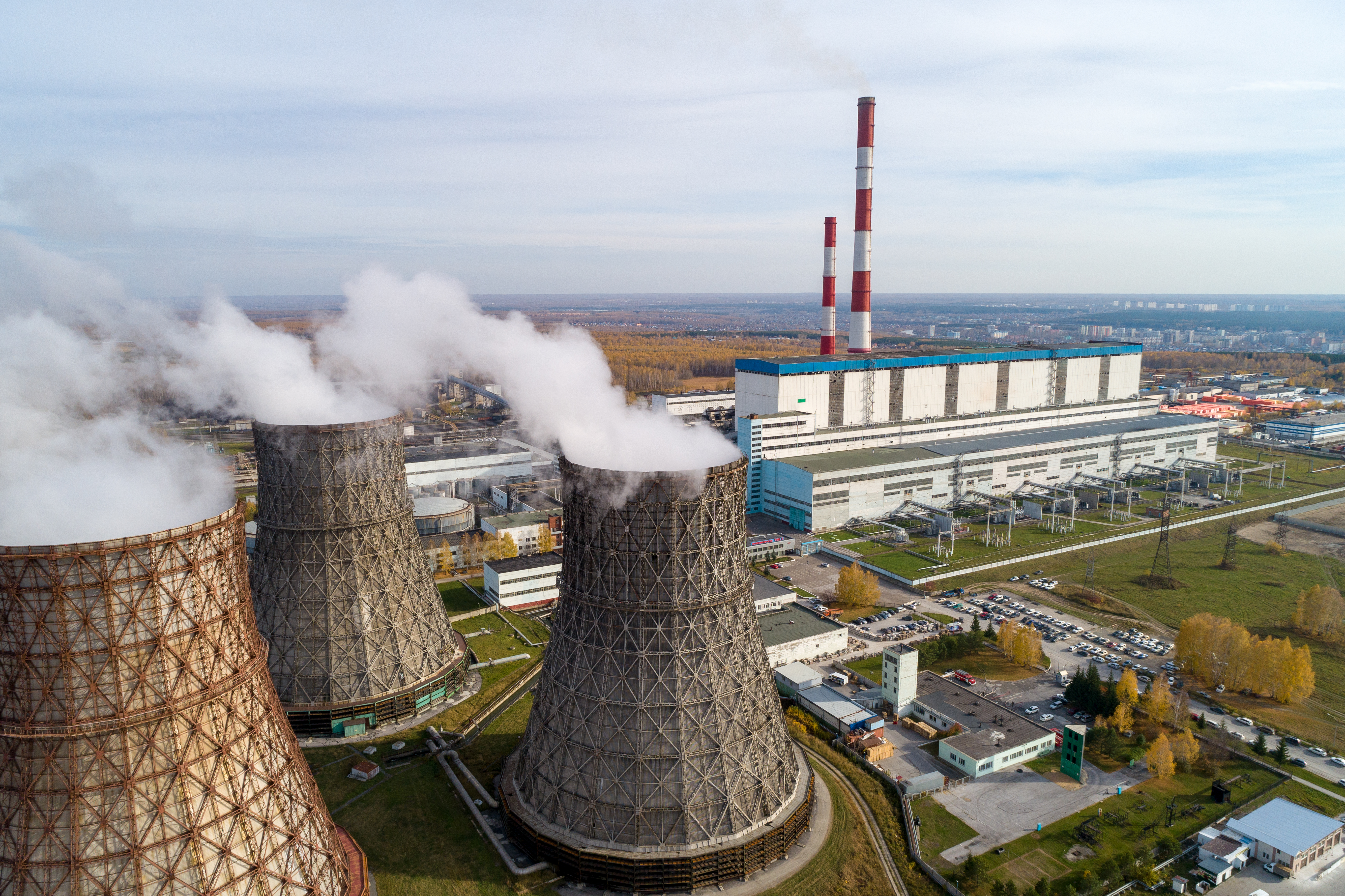 Новосибирская ТЭЦ-5 с высоты птичьего полёта